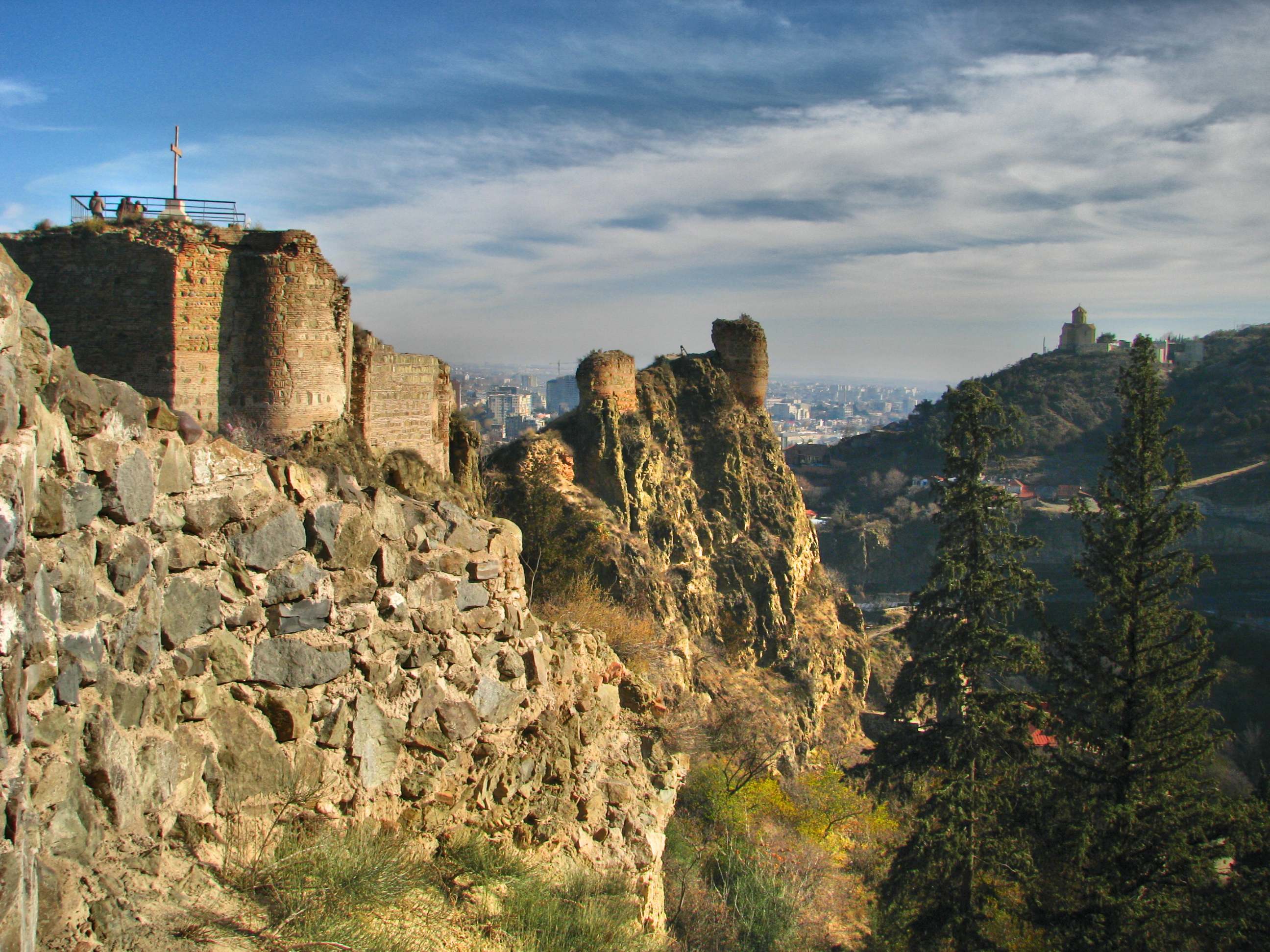 Narikala, Tbilisi.